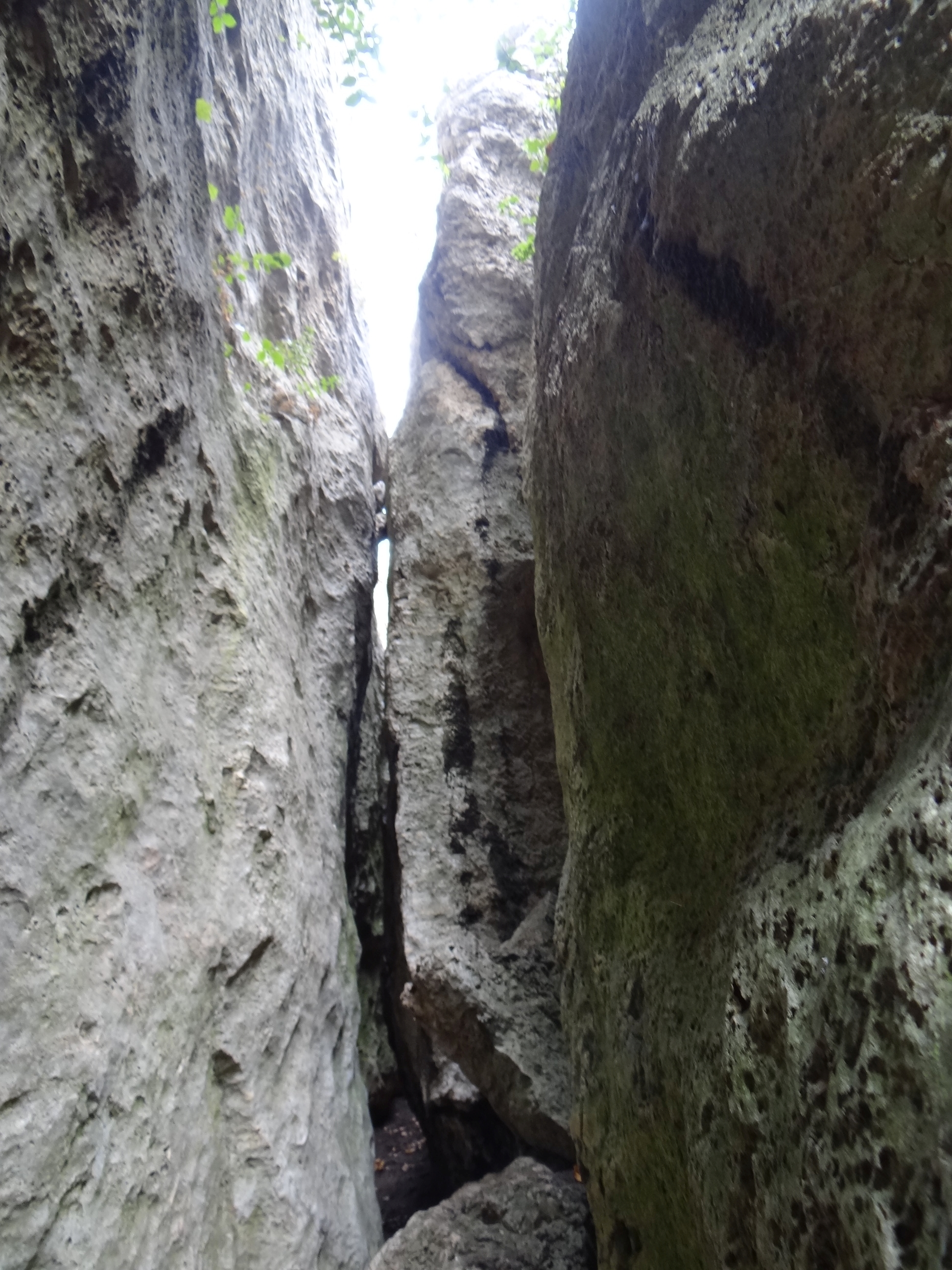 Skała Słoń w Łutowcu